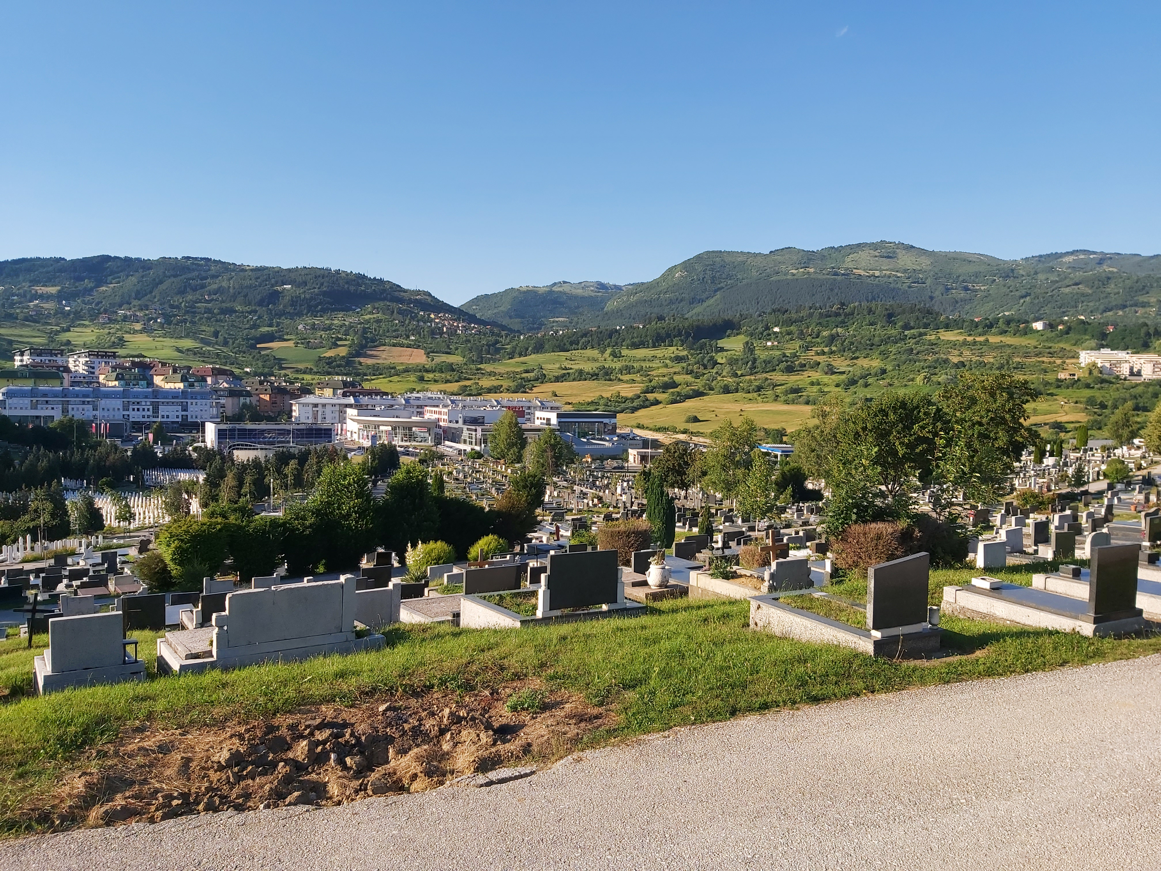 Groblje Bare